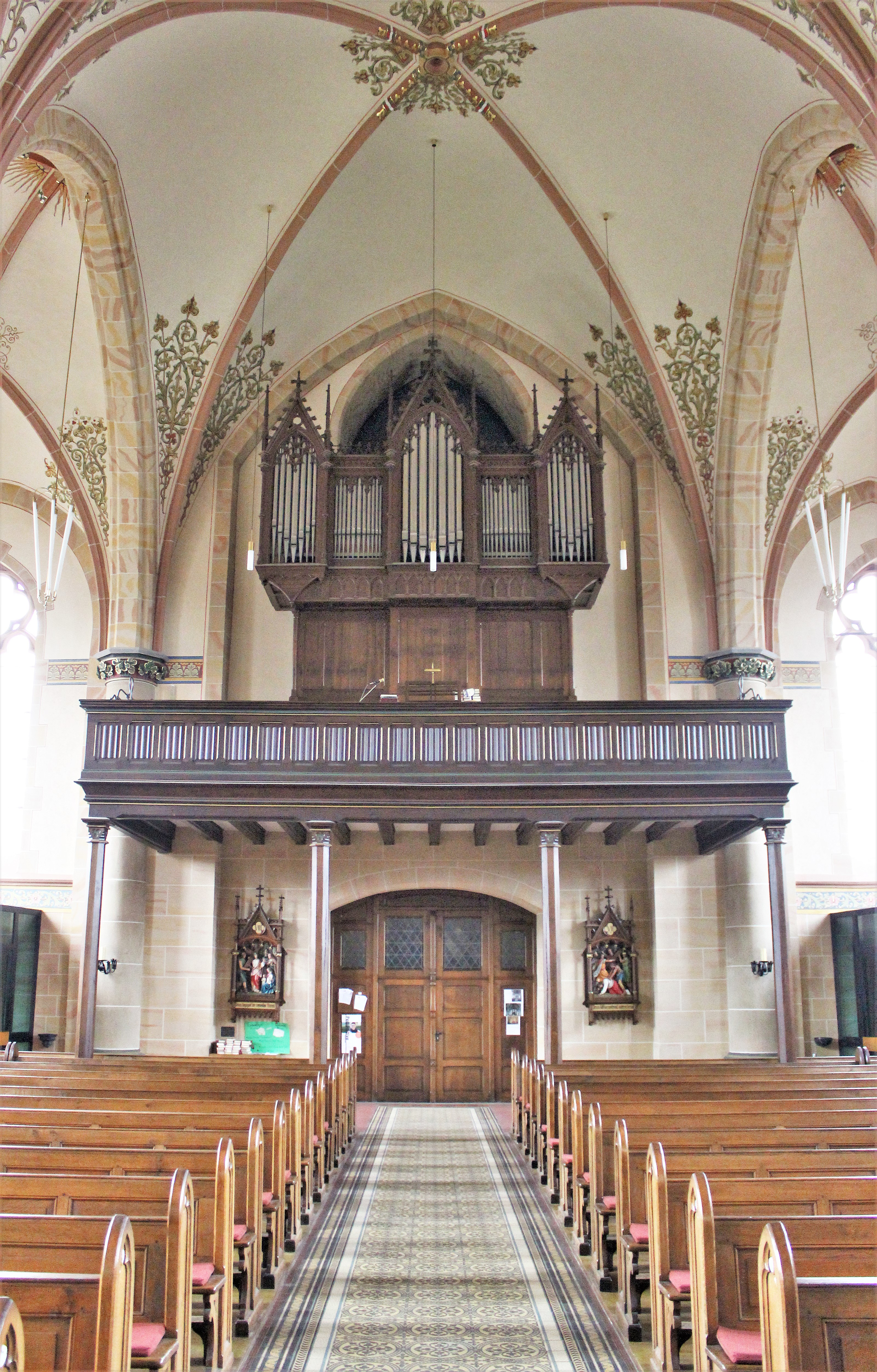 Empore und Orgelprospekt der katholischen Pfarrkirche Herz Jesu in Nunkirchen, einem Stadtteil von Wadern, Landkreis Merzig-Wadern, Saarland